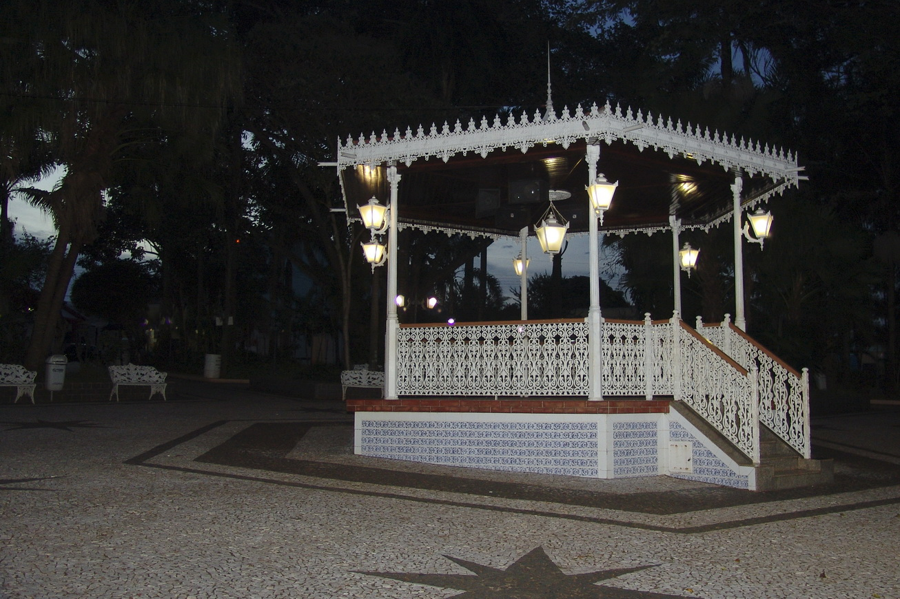 Foto do município de Cesário Lange, São Paulo, Brasil